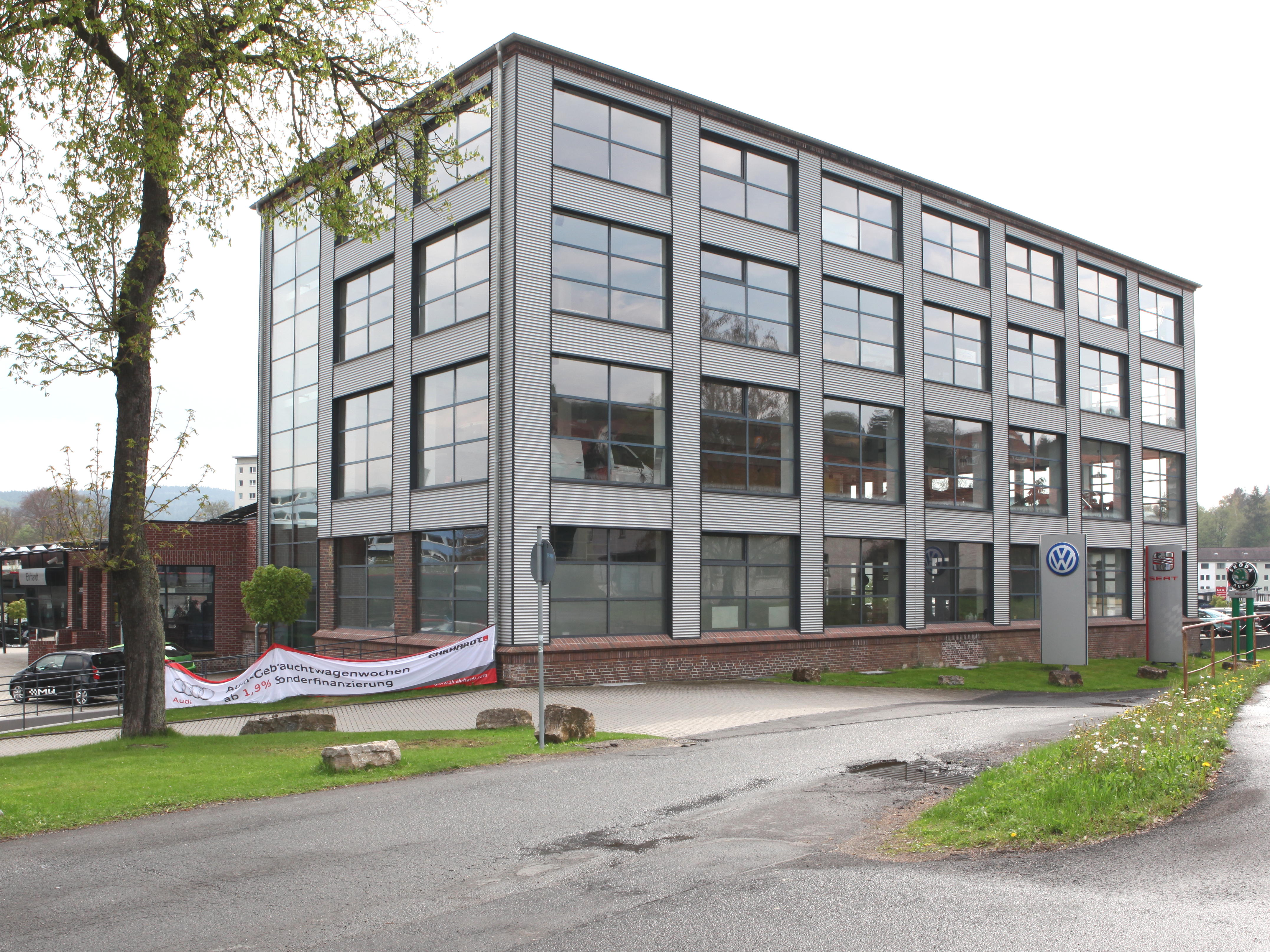 Karabinerbau aus dem Jahr 1937 von Sauer&Sohn in Suhl. Das Bauwerk erhielt den Thüringer Denkmalschutzpreis 2007 in der Kategorie "Technische Denkmale".